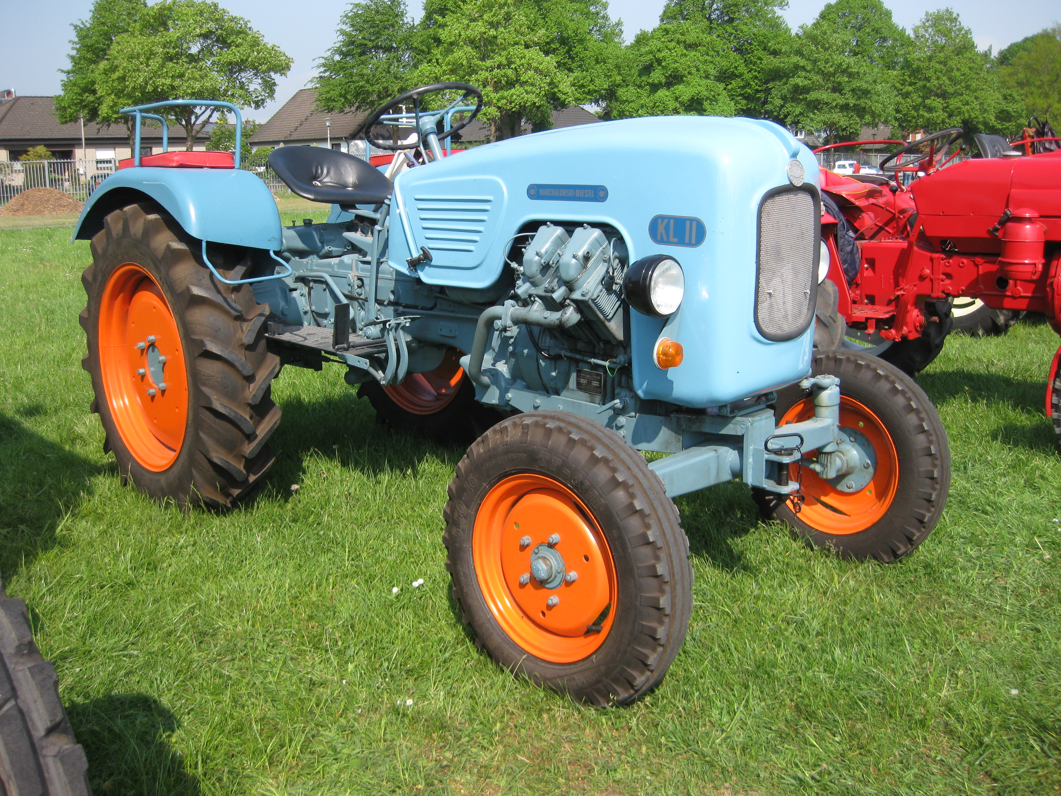 Traktor Warchalowski